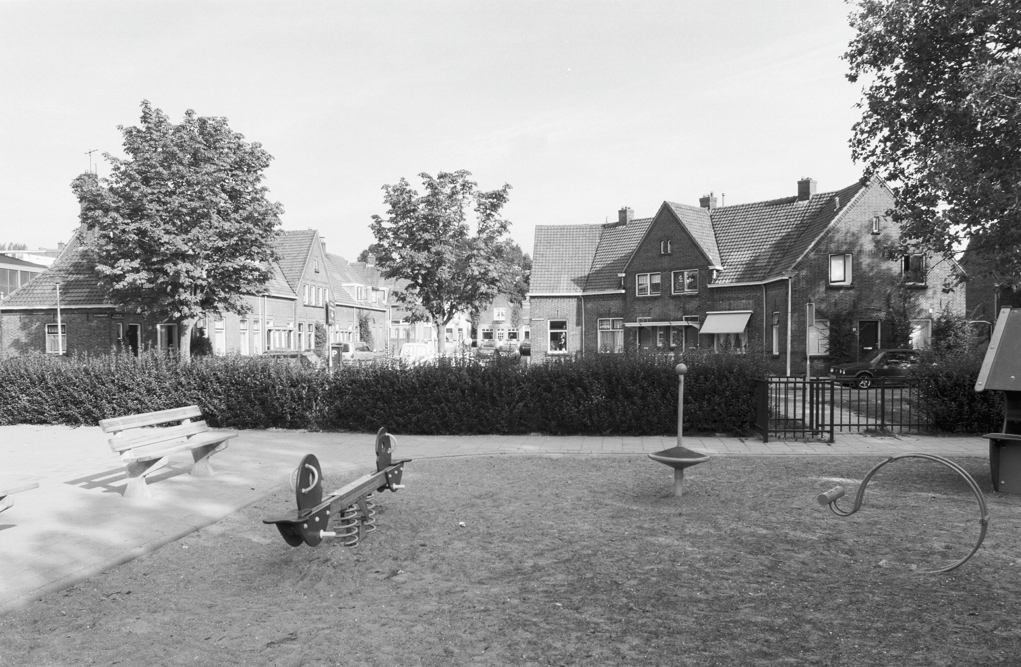 Speelplaats: Overzicht met speelplaats (opmerking: Gefotografeerd voor De Nederlandse Monumenten van Geschiedenis en Kunst, Gouda)